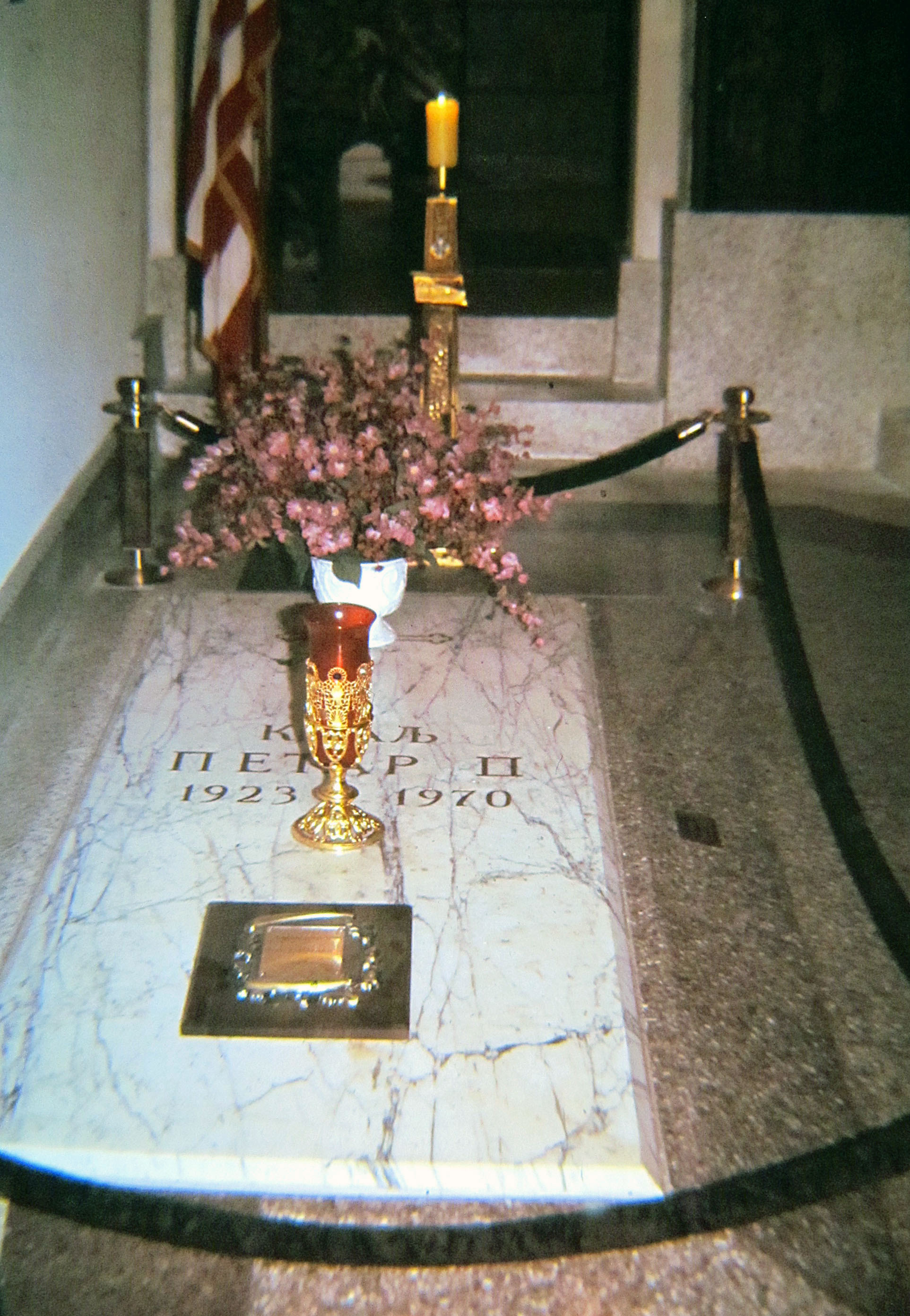 скенирани слајд снимио Михаило Грбић Licensing